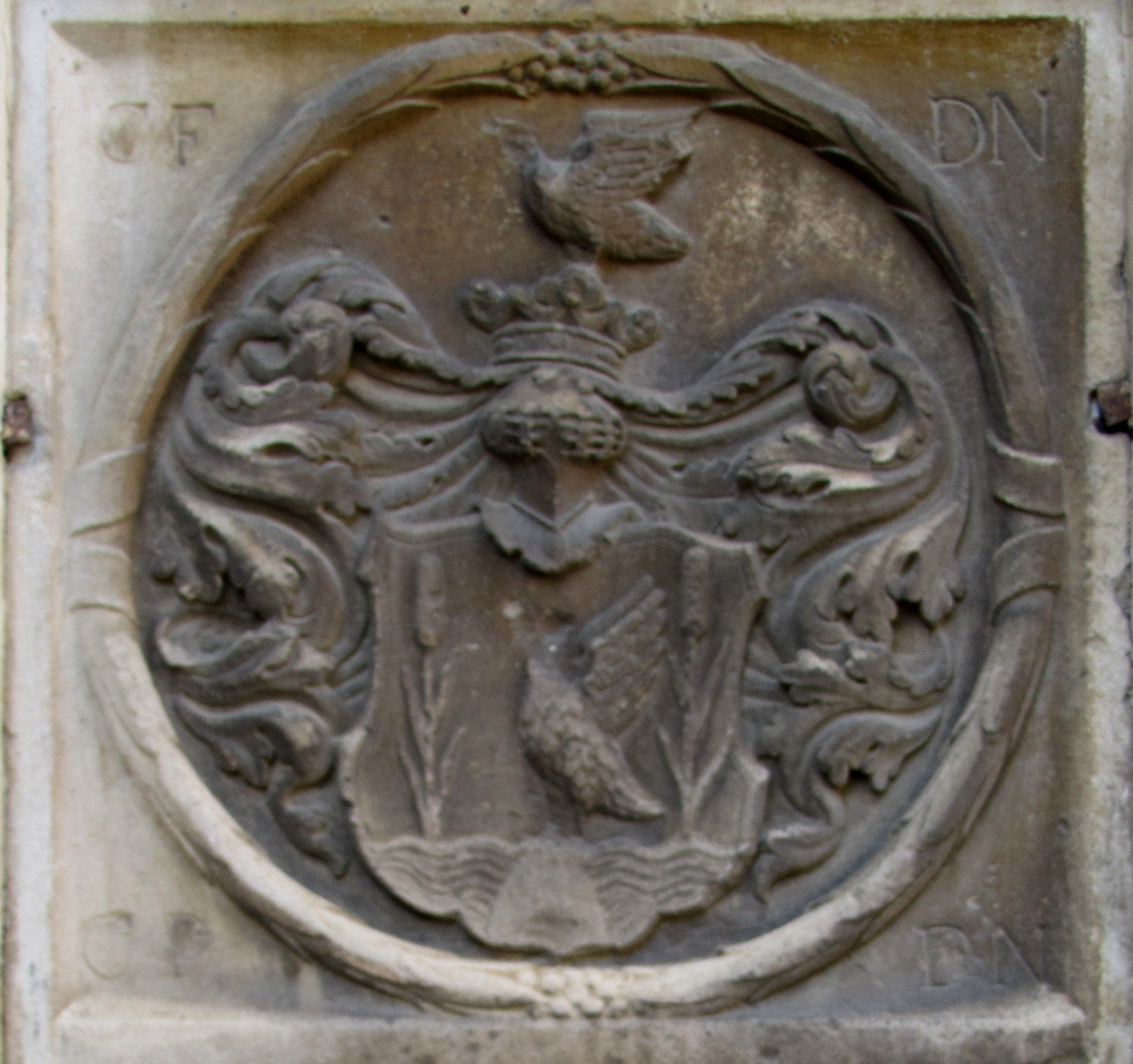 A sárvári vár udvarán található Nádasdy címer